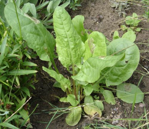 Rumex acetosa cultivar